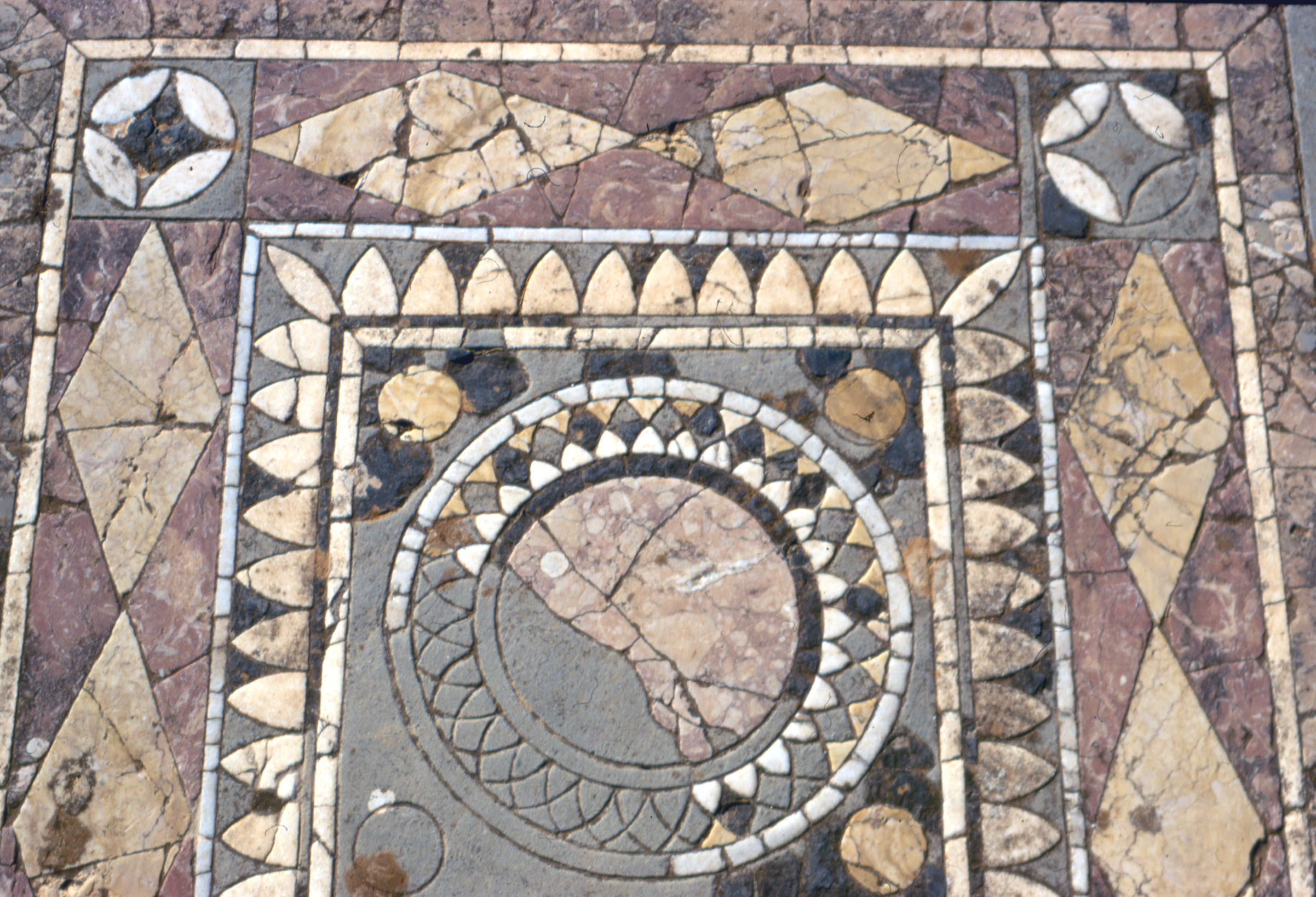 Libia, Cirene (sito archeologico), Insula di Giasone Magno, Triclinio estivo, pavimentazione in opus sectile, particolare